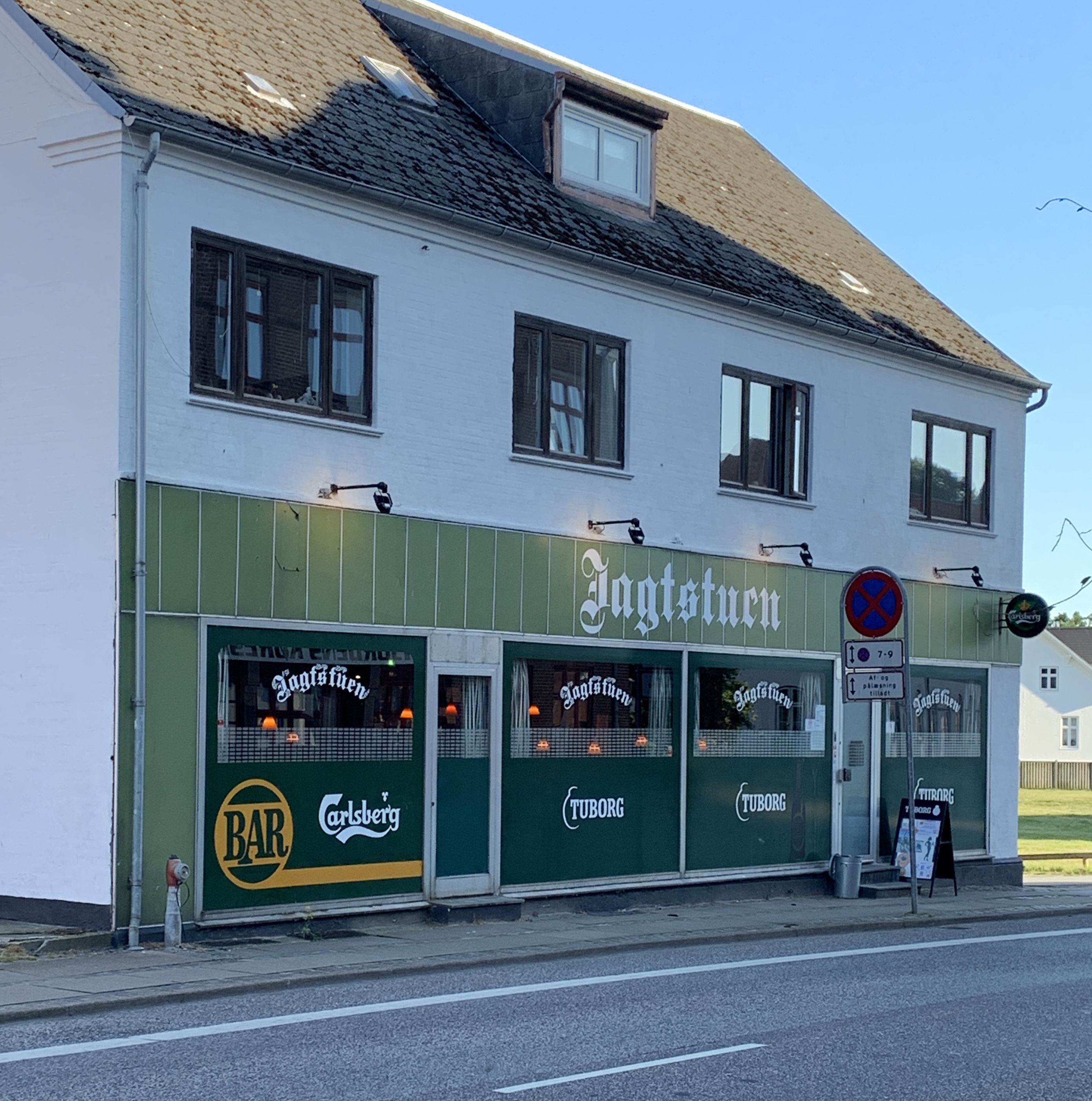 Bodegaen Jagtstuen på Storegade i Hadsund.